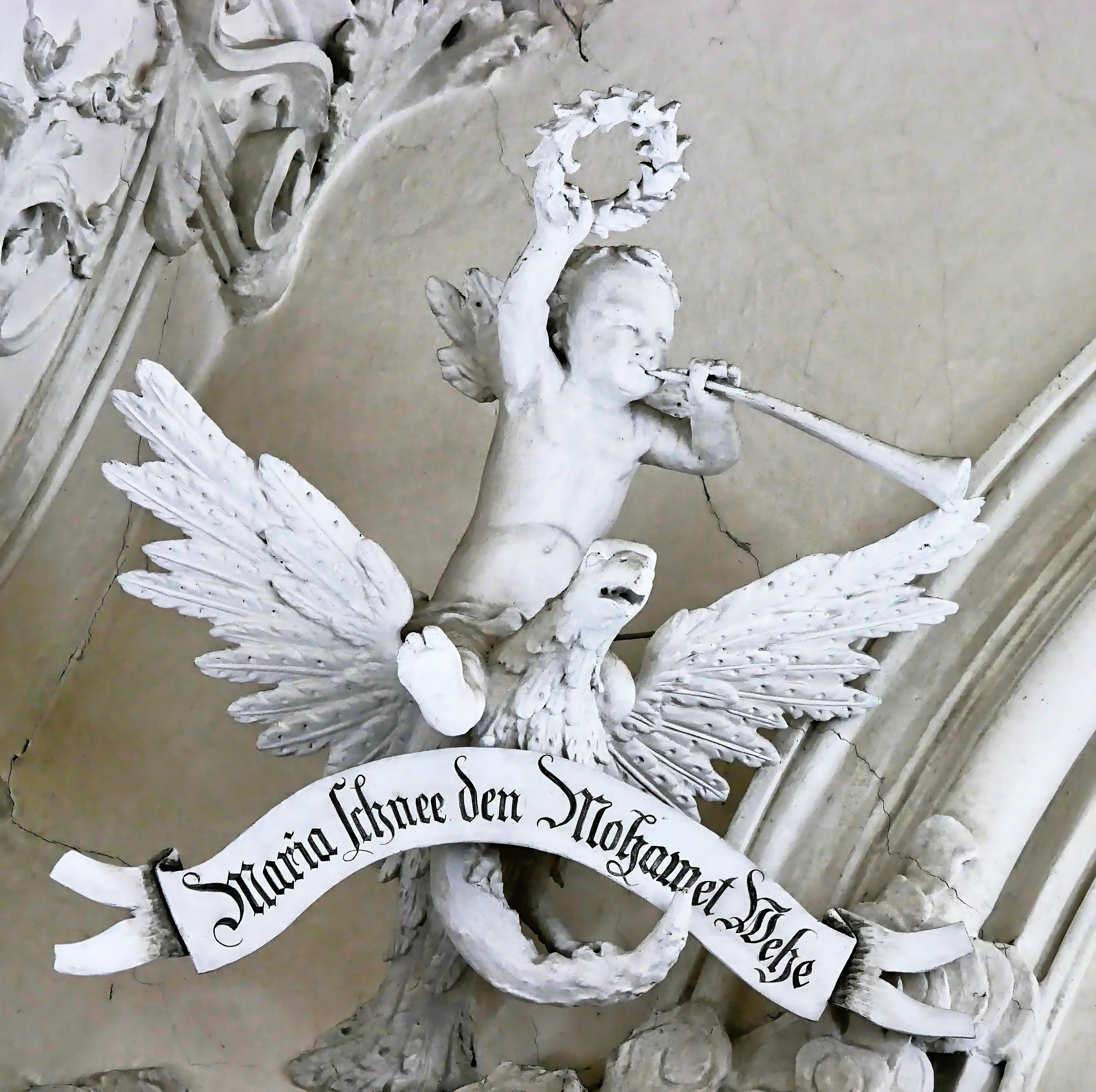 Wallfahrskapelle Maria Schnee in Lehenbühl bei Legau - Stuckengel auf Reichsadler mit dem Schriftband „Maria Schnee den Mohamet Wehe“: Anspielung auf den Sieg der kaiserlichen Truppen in der Schlacht von Peterwardein am 5. August 1716 über die Osmanen.